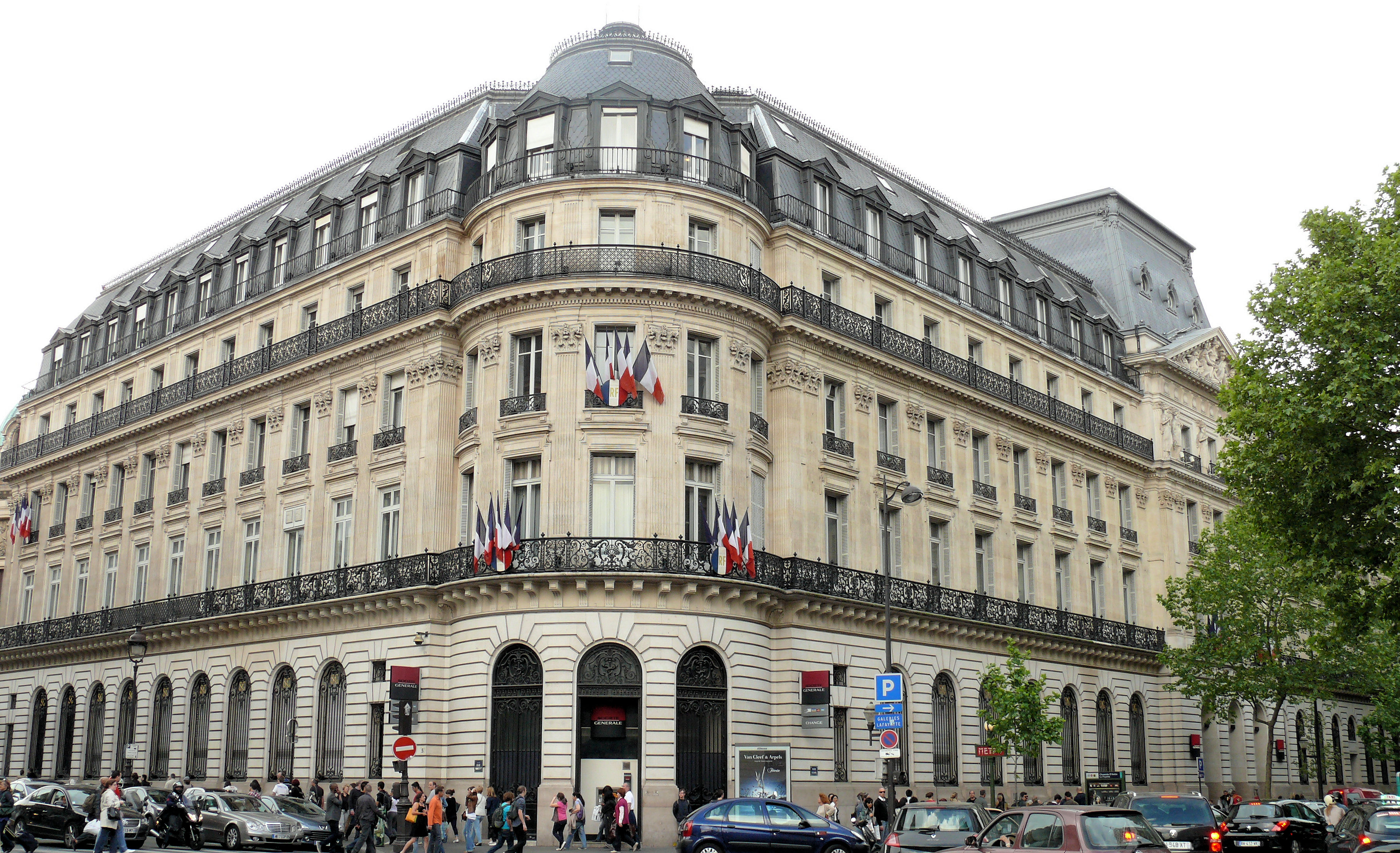 Paris 9 - Immeuble de la Société Générale